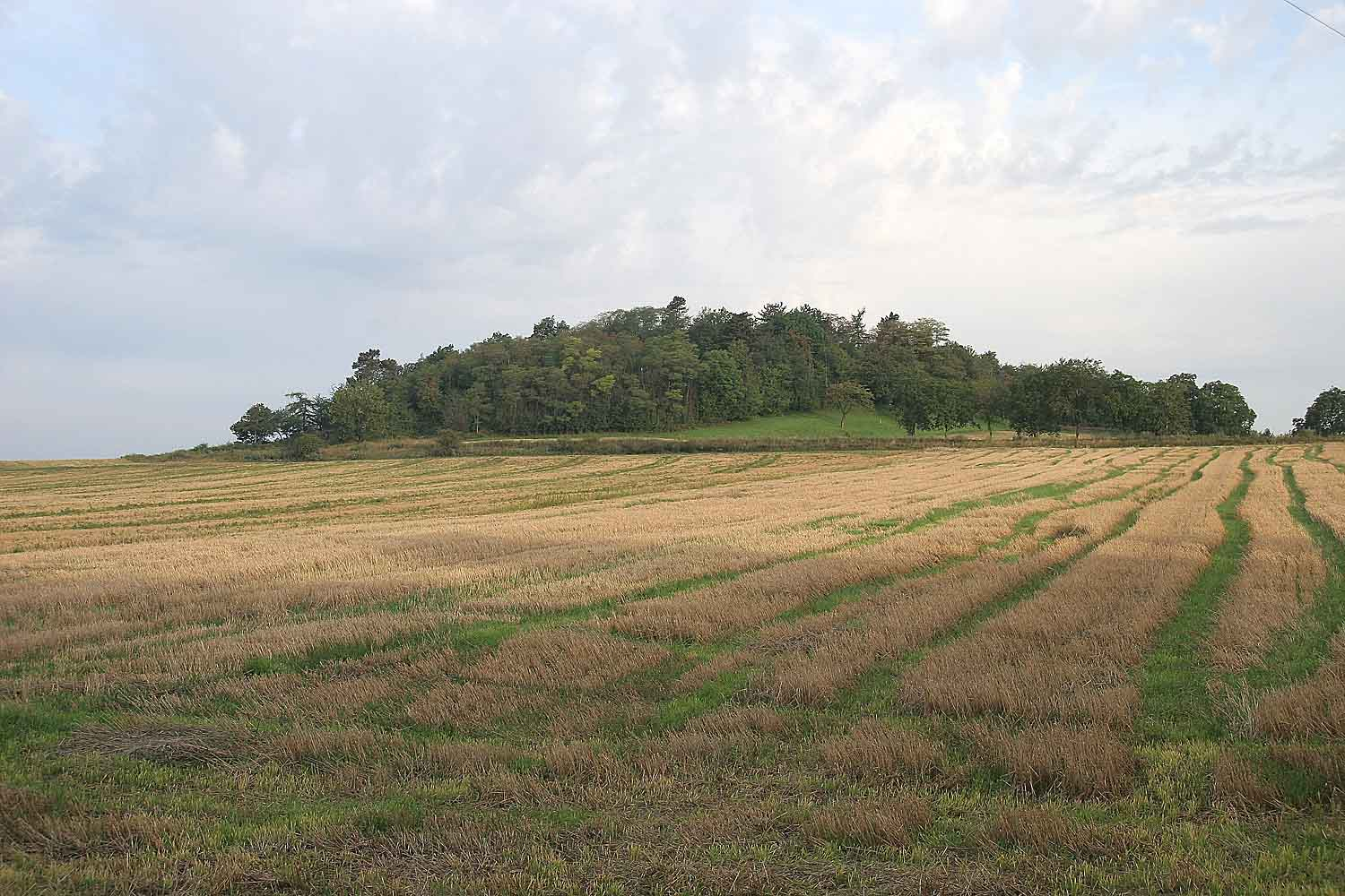 PP Číčovický kamýk, district Praha-západ, Czech Republic autor:Prazak date: 2. 9. 2006